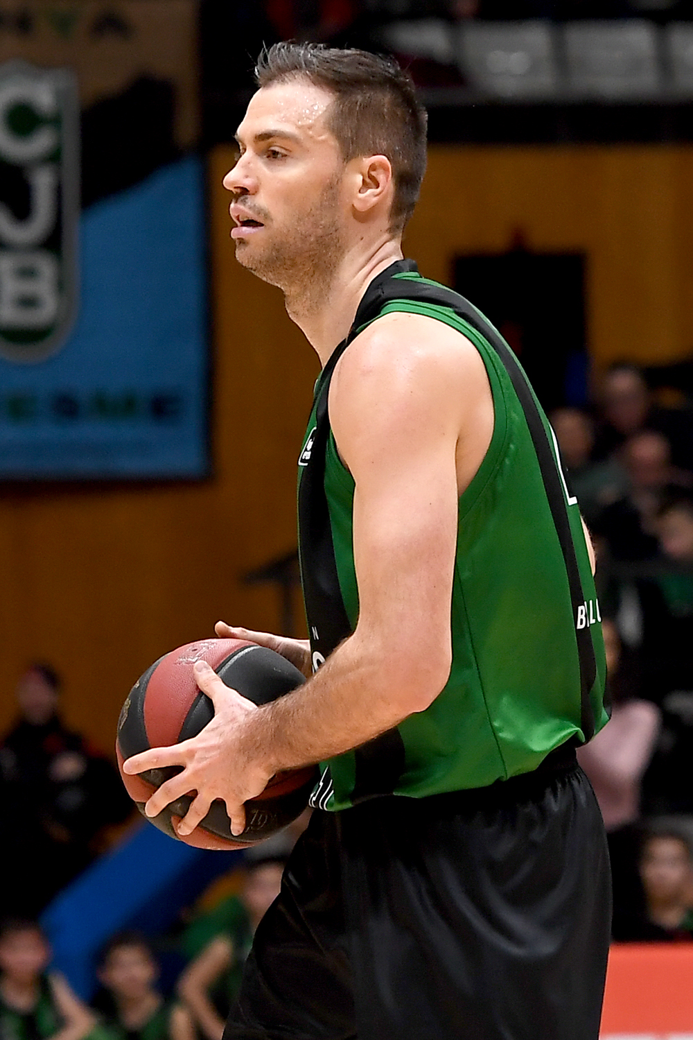 Oliver Stevic en un partit de l'ACB 2019-20 amb el Club Joventut Badalona